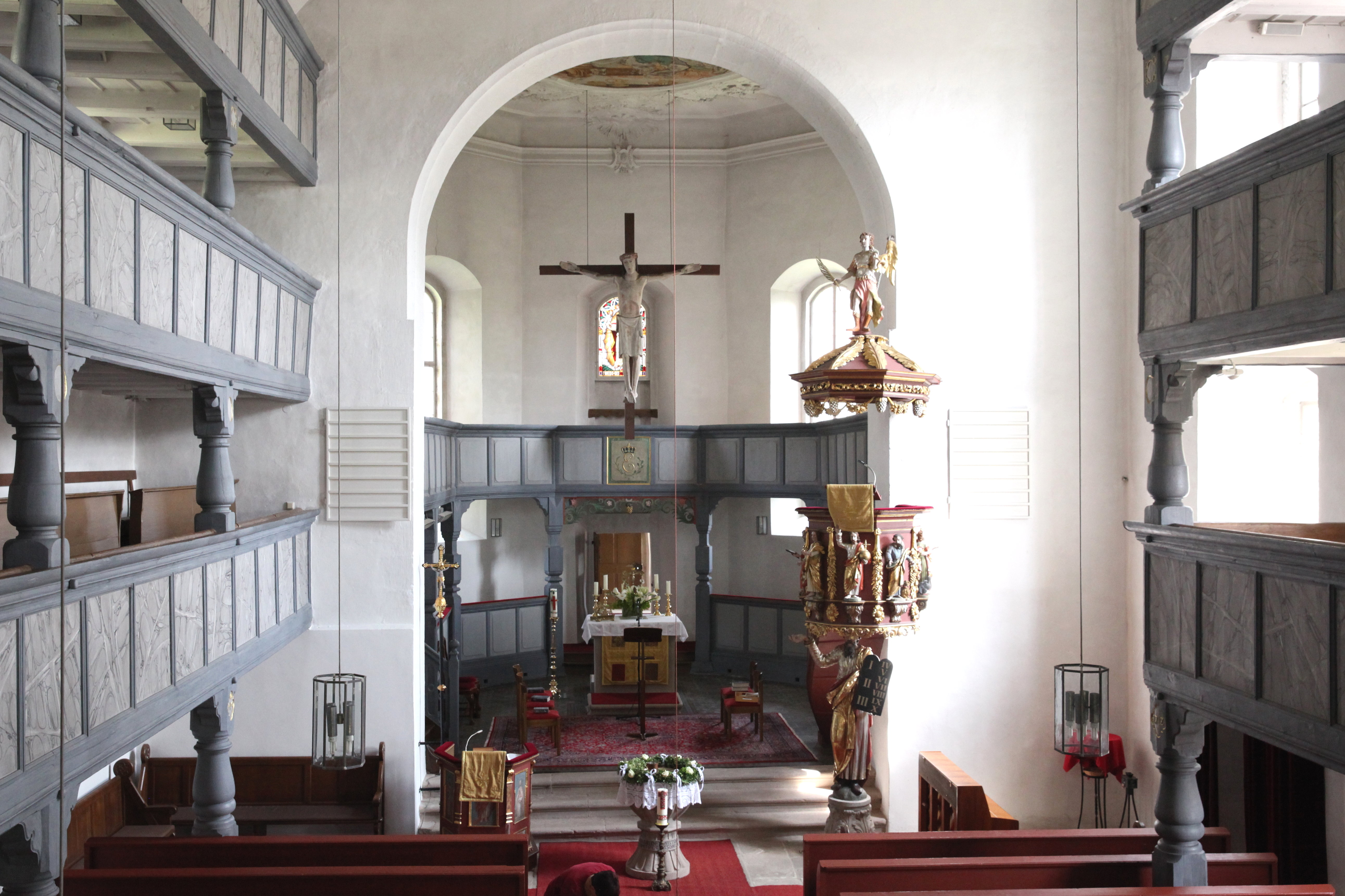 Innenraum, Evangelische Matthäuskirche, Gestungshausen